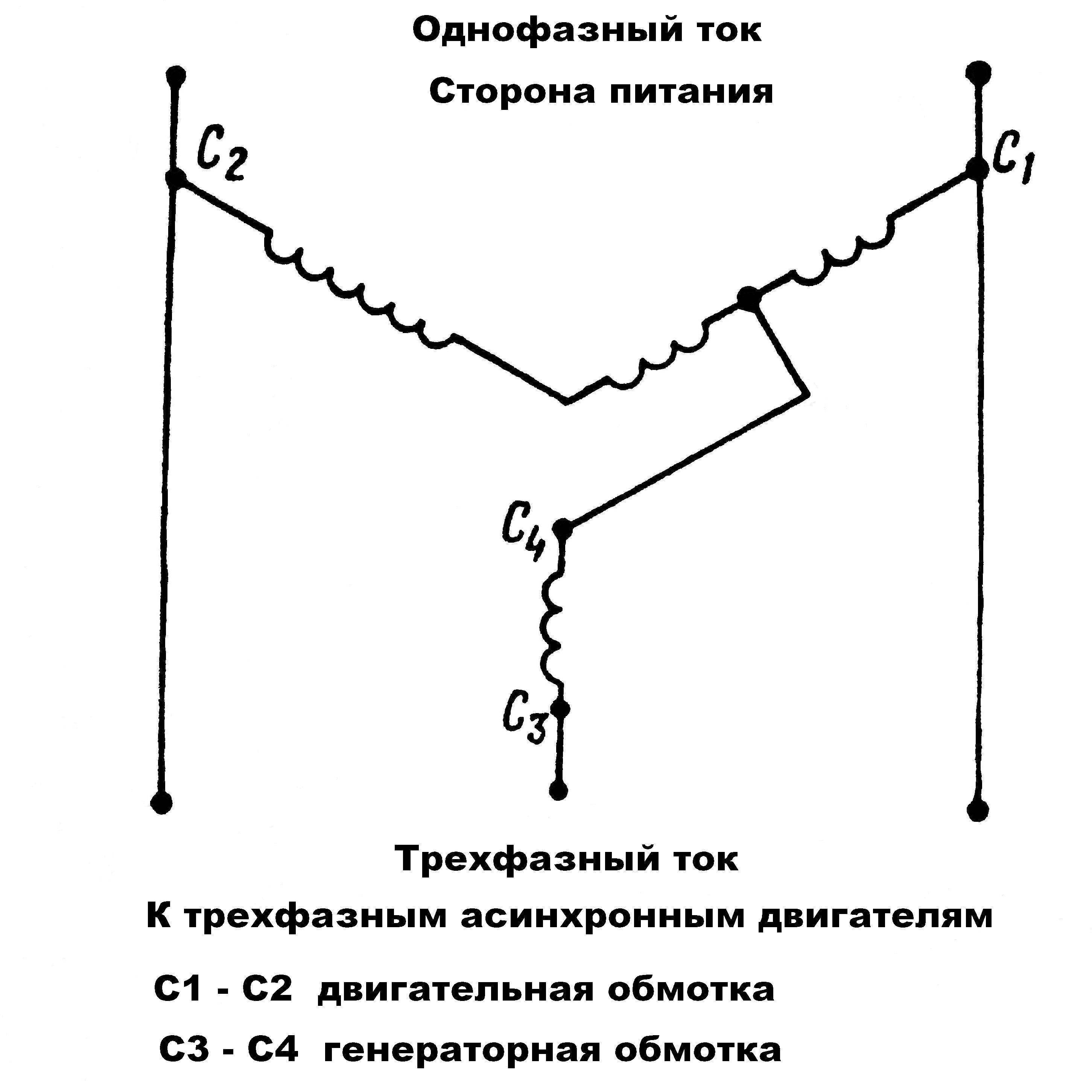 Схема фазорасщепителя